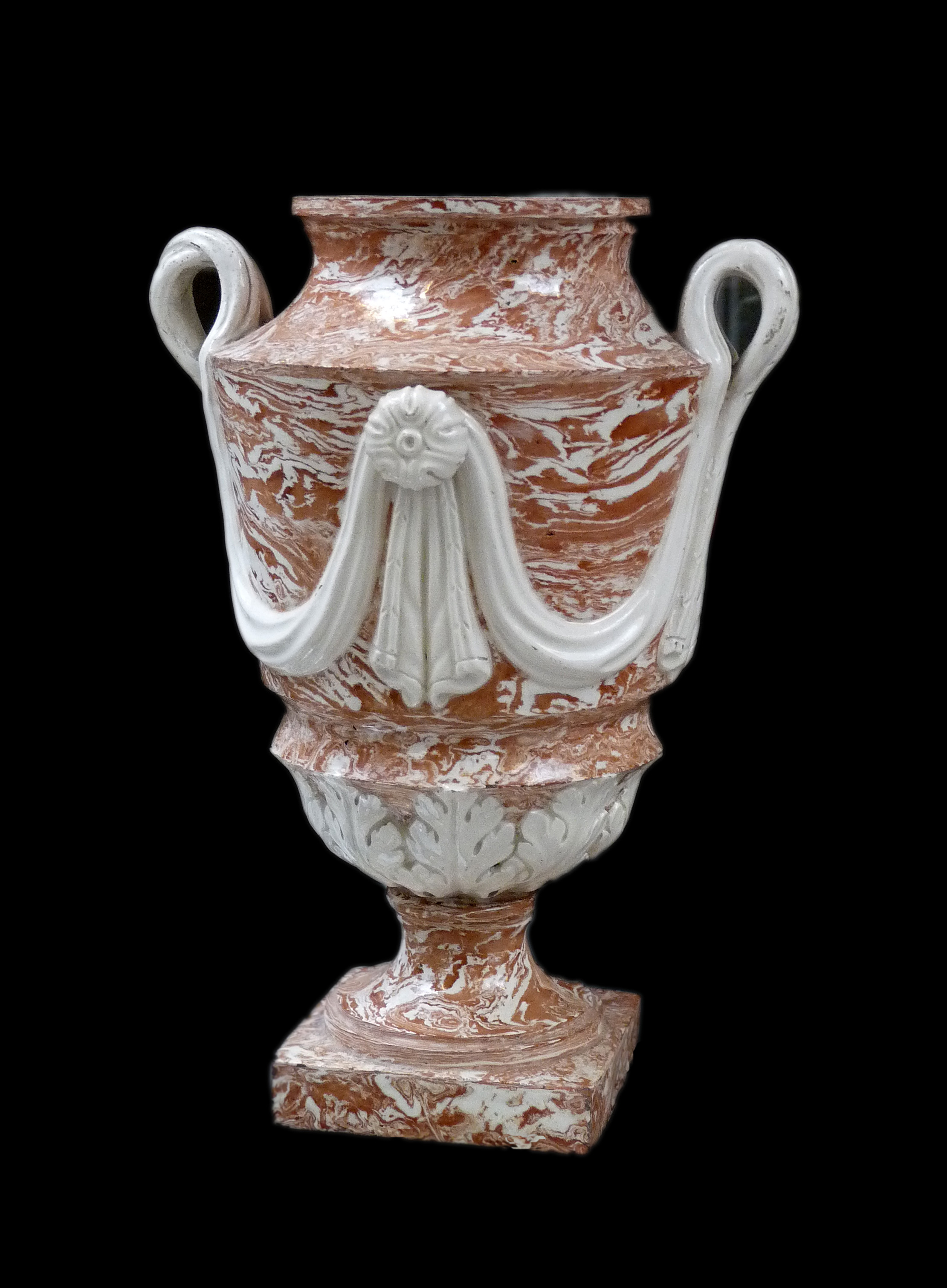 Vase. Cailloutage de Gérardmer. Vers 1825. Musée Pierre-Noël, Saint-Dié-des-Vosges